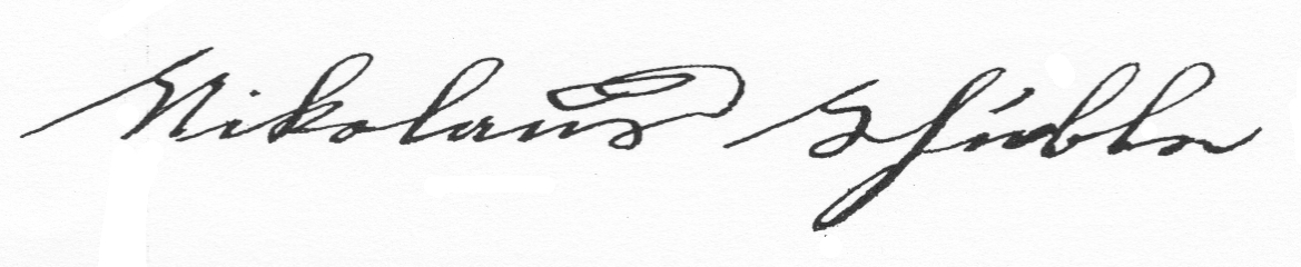 Unterschrift des Orgelbauers Nikolaus Schuble